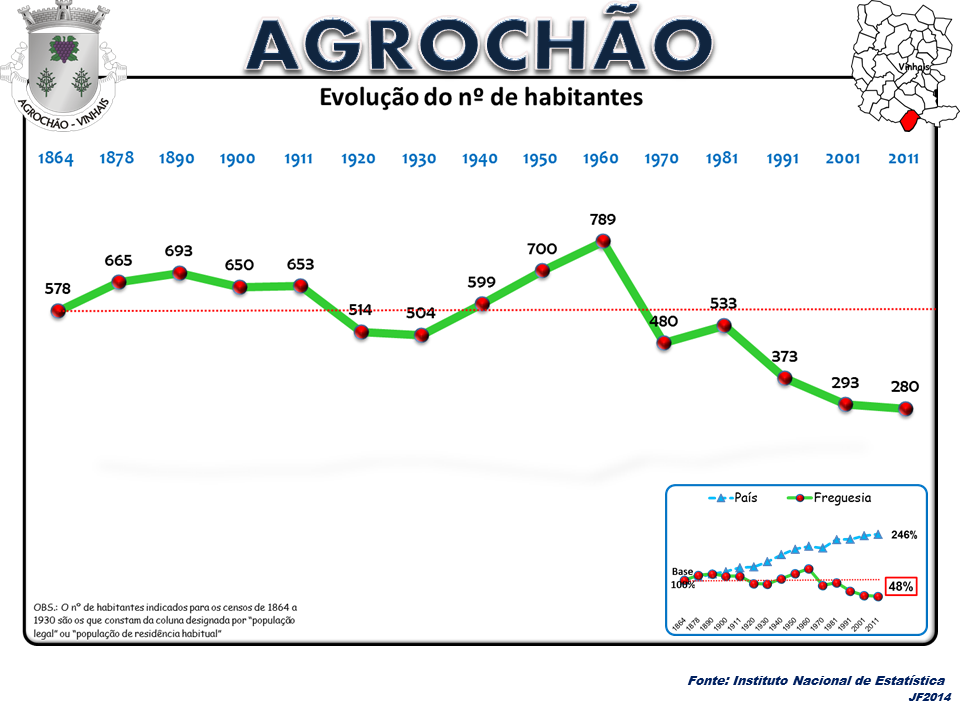 Evolução da População 1864 / 2011